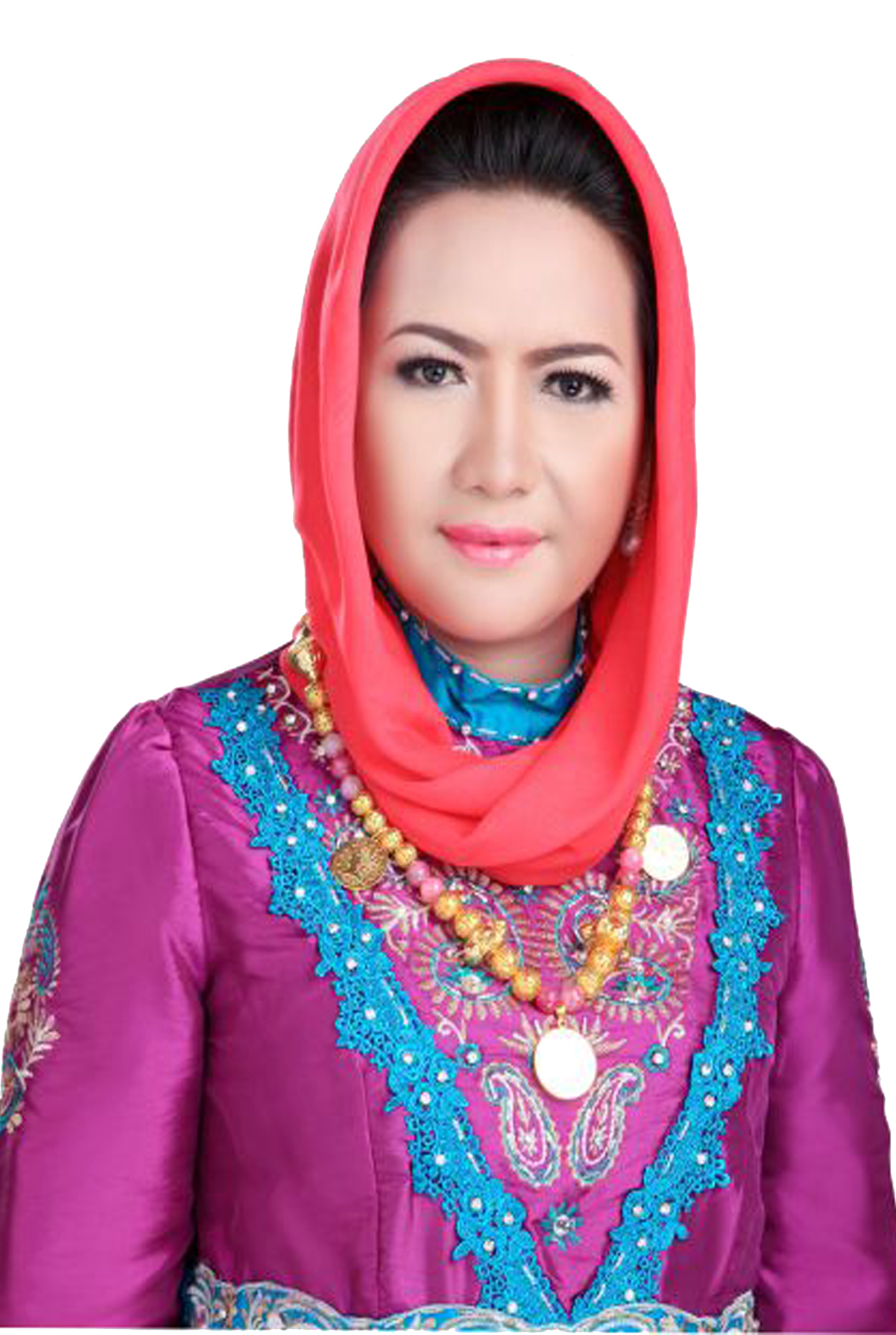 Winarti